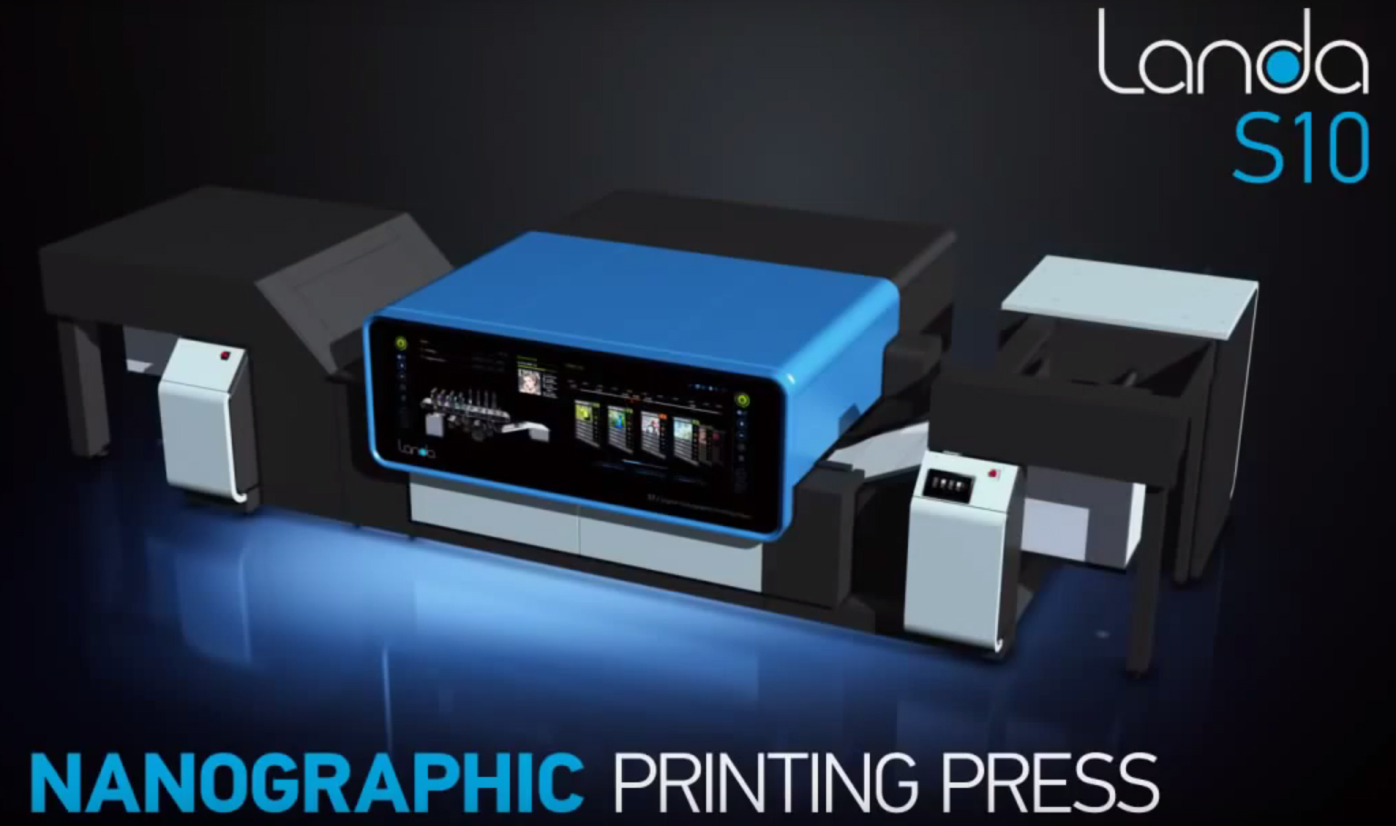 Nanography nueva tecnología,calidad offset al precio de la impresión digital.